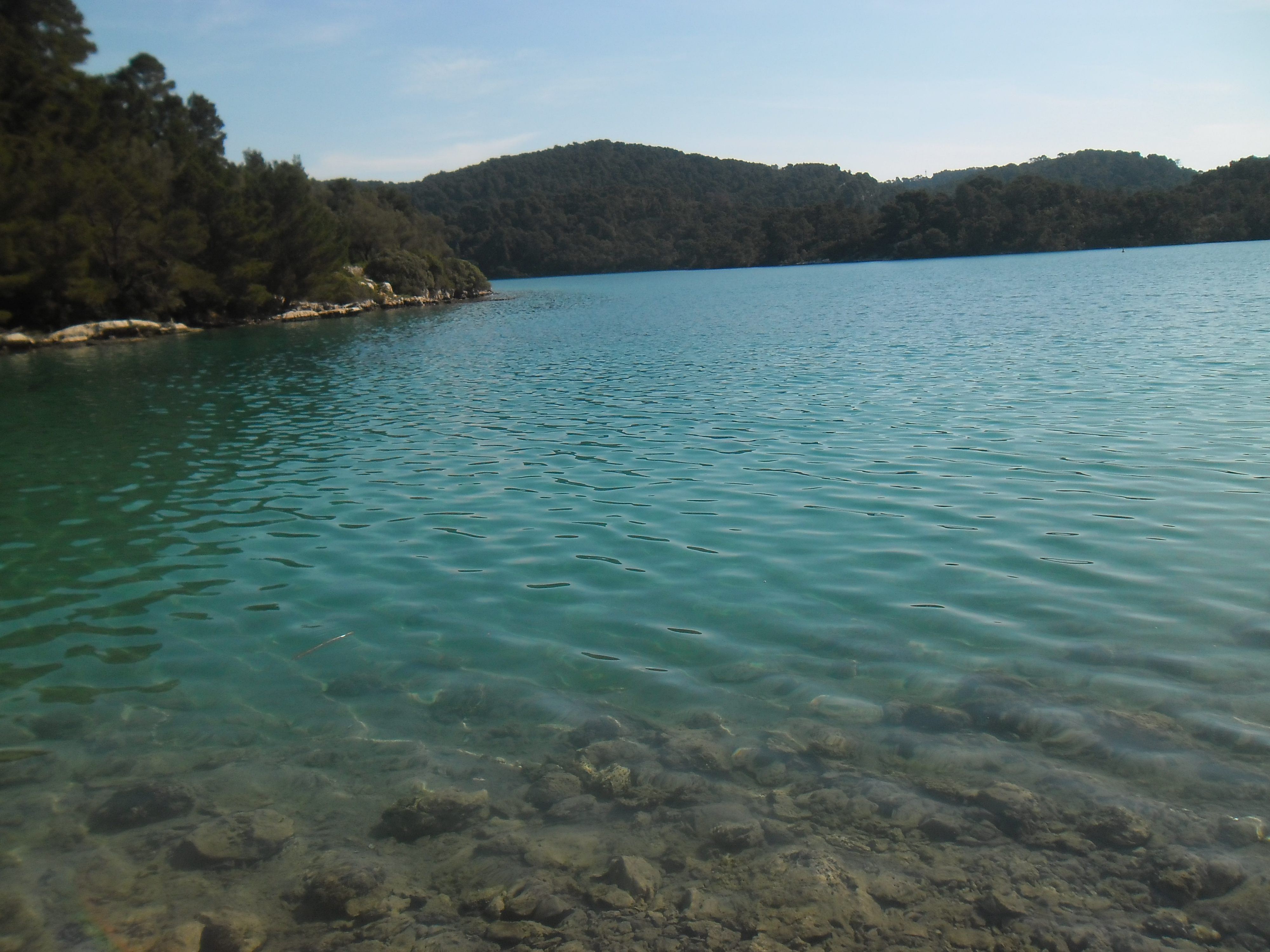 otok Mljet